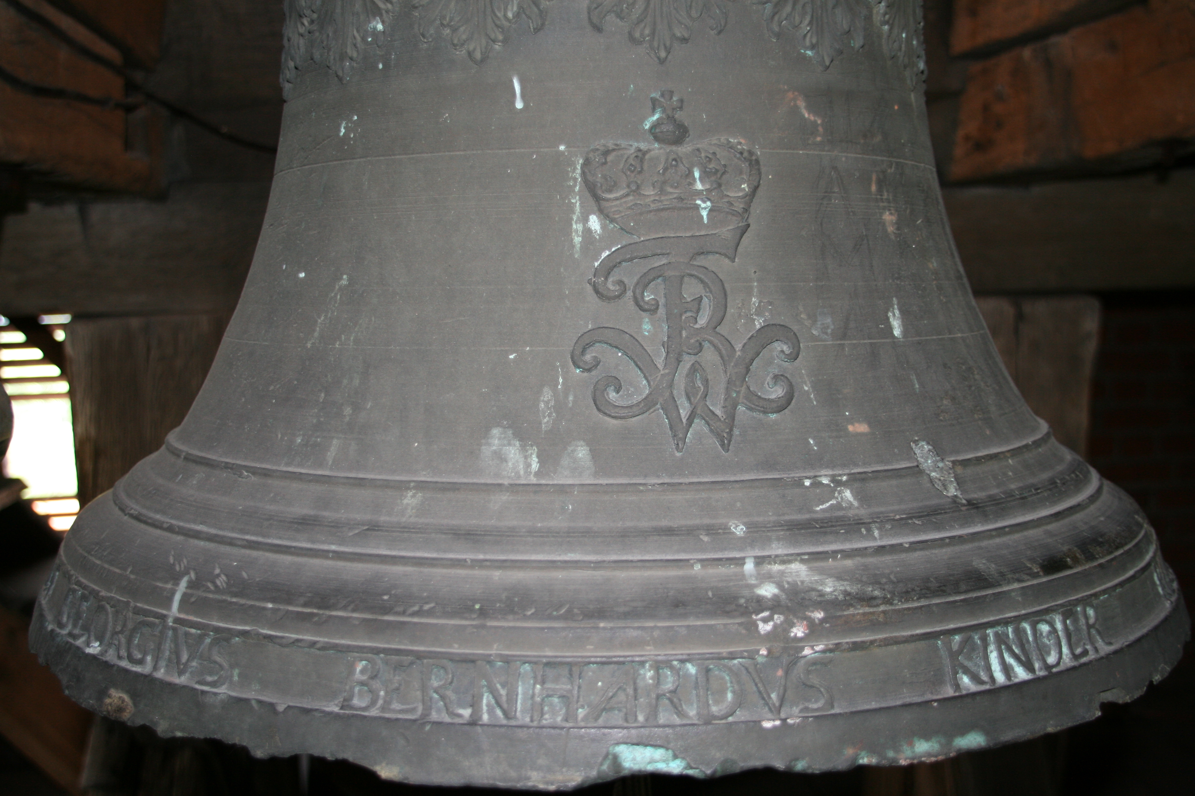 Detail der großen Kirchenglocke in Friedland/Prawdinsk